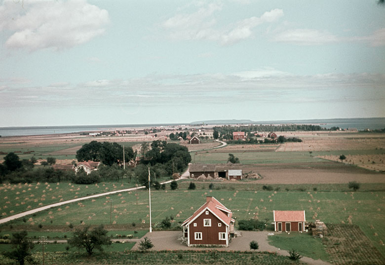 Visingsö island in Lake Vättern. View from the tower of Kumlaby church. Visingsö i Vättern, Vy från tornet på Kumlaby kyrka. Parish (socken): Visingsö Province (landskap): Småland Municipality (kommun): Jönköping County (län): Jönköping Photograph by: Fredrik Bruno Date: 1945 Format: Colour slide Persistent URL: Read more about the photo database (in english)